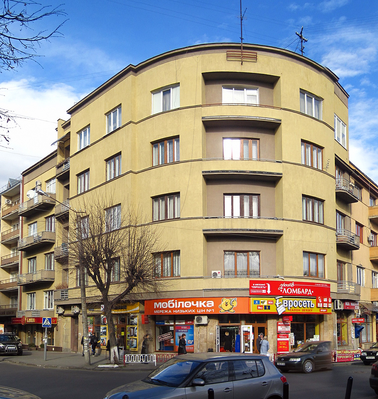 Вул. Бельведерська, 2